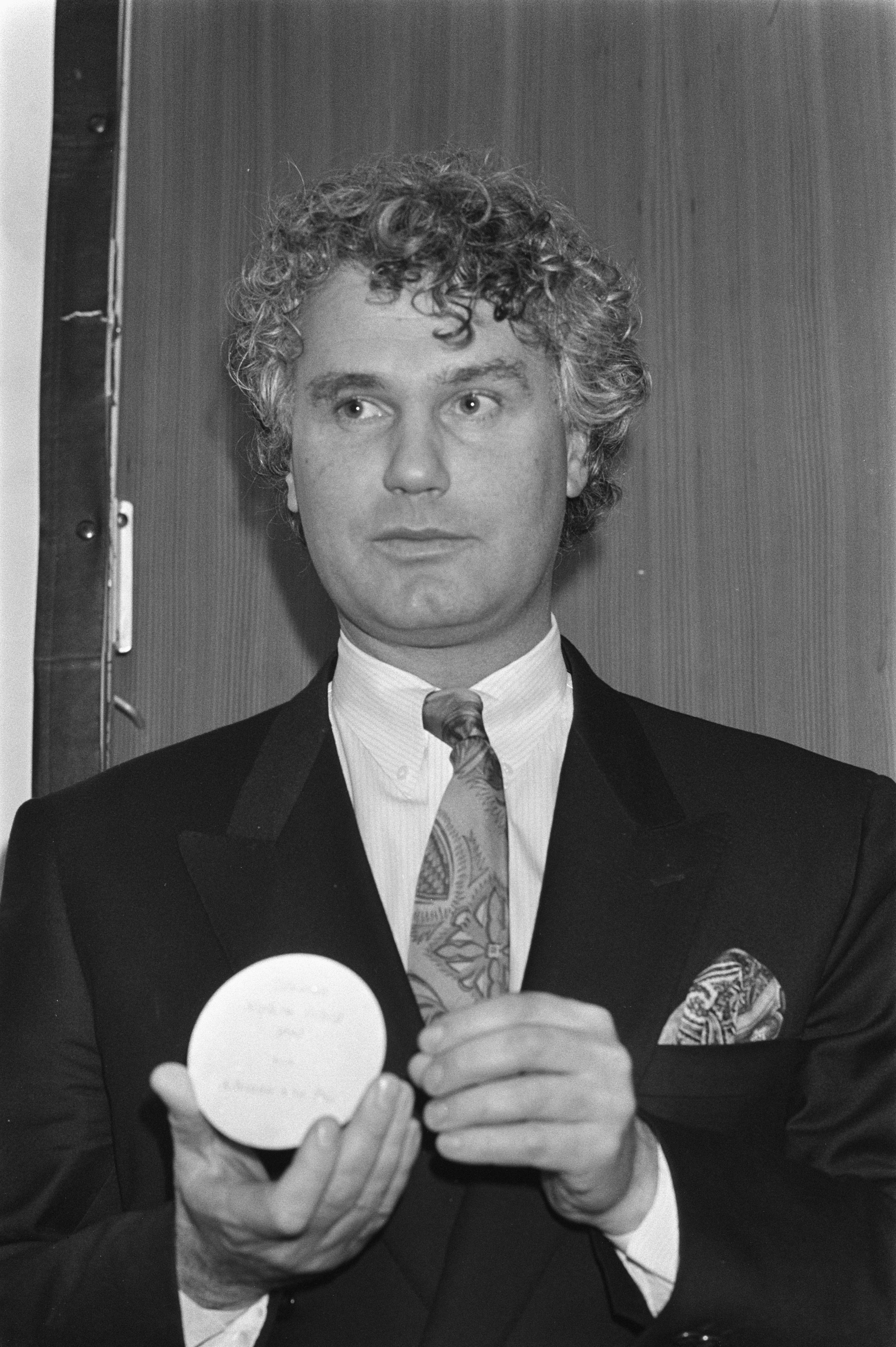 Collectie / Archief : Fotocollectie Anefo Reportage / Serie : [ onbekend ] Beschrijving : Uitreiking zilveren Reiss-microfoon en Nipkowschijf aan resp. Ivo de Wijs en Adriaan van Dis in RAI Amsterdam; Adriaan van Dis met Nipkowschijf Datum : 29 augustus 1986 Locatie : Amsterdam, Noord-Holland Persoonsnaam : Dis, Adriaan van Instellingsnaam : Nipkowschijf Fotograaf : Croes, Rob C. / Anefo Auteursrechthebbende : Nationaal Archief Materiaalsoort : Negatief (zwart/wit) Nummer archiefinventaris : bekijk toegang 2.24.01.05 Bestanddeelnummer : 933-7433